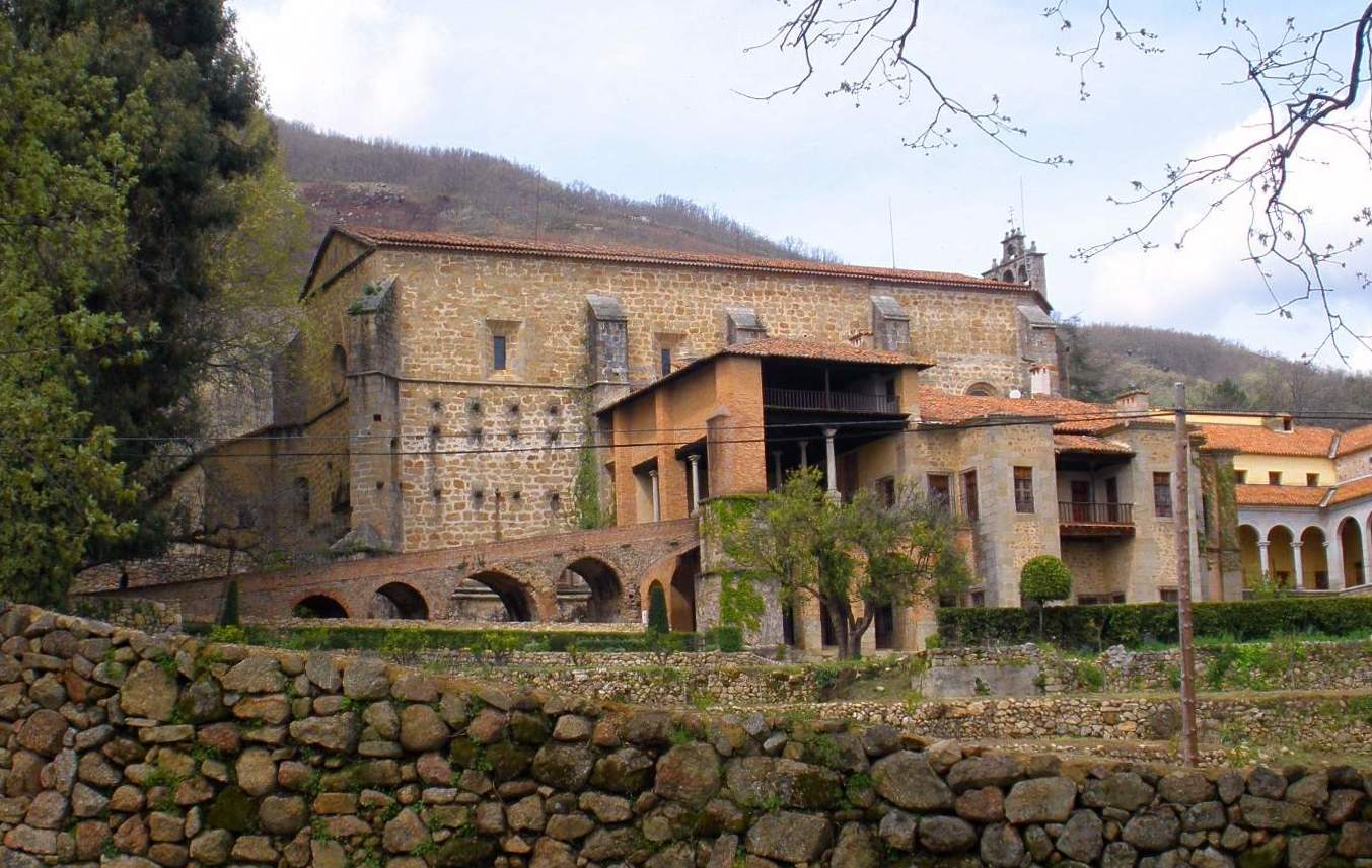 Monasterio de San Jerónimo de Yuste (Cuacos de Yuste, Cáceres)